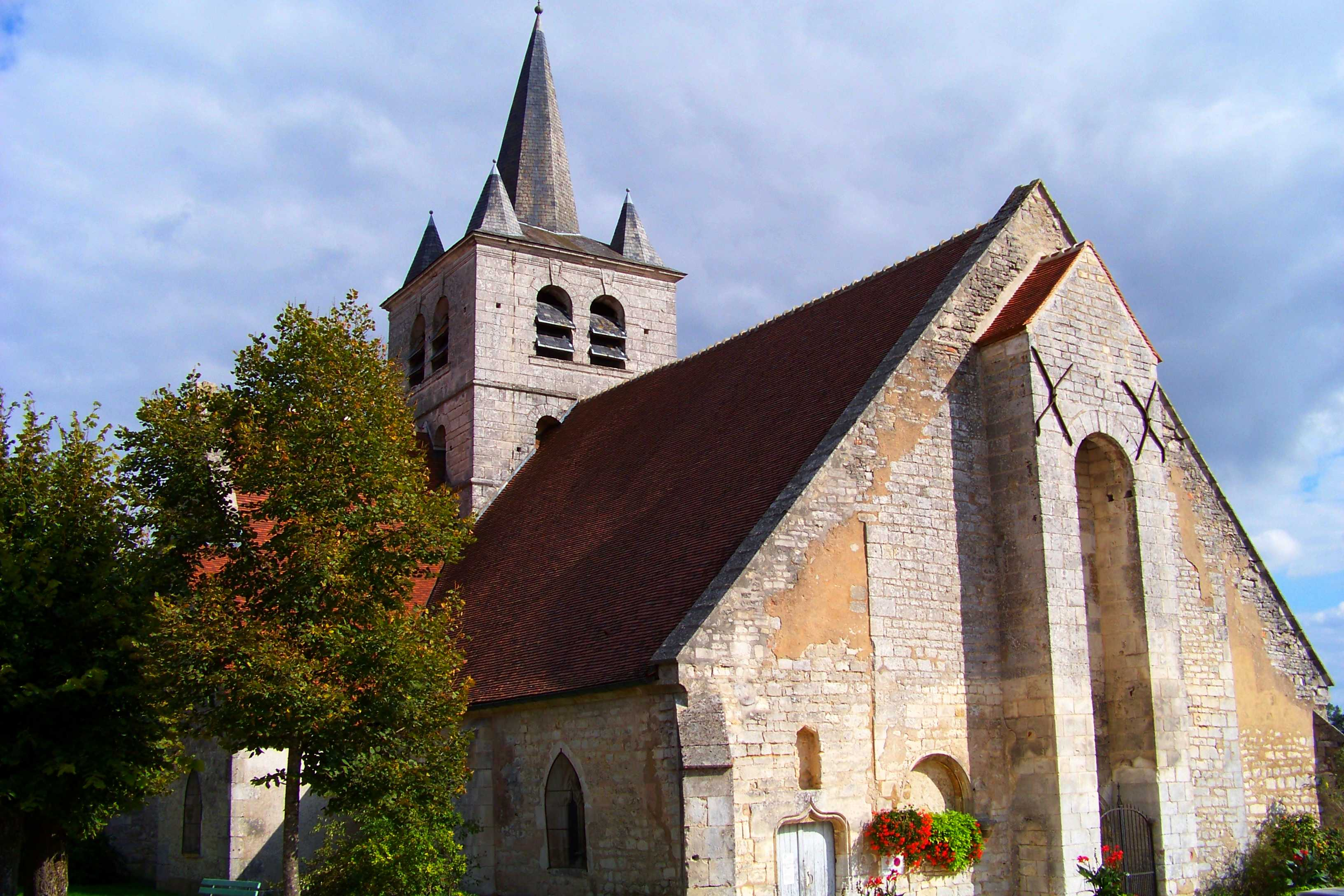 Église Saint-Cyr et Sainte-Julitte de Saint-Cyr-les-Colons